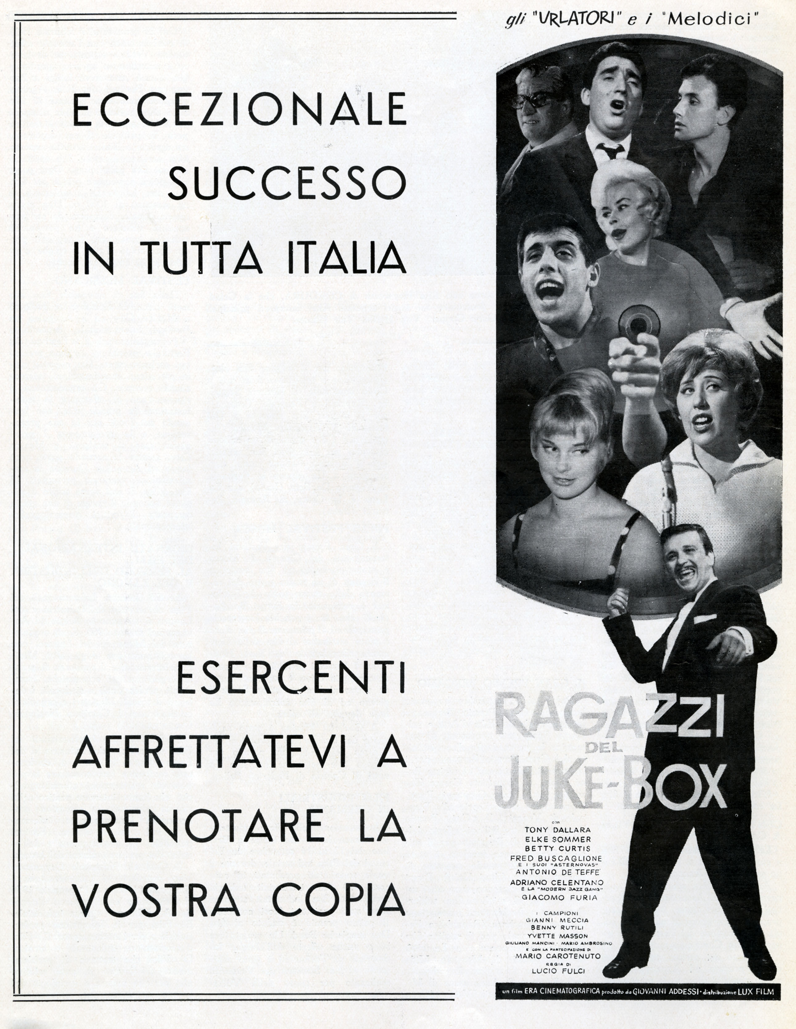 Inserto pubblicitario per il film I ragazzi del juke-box